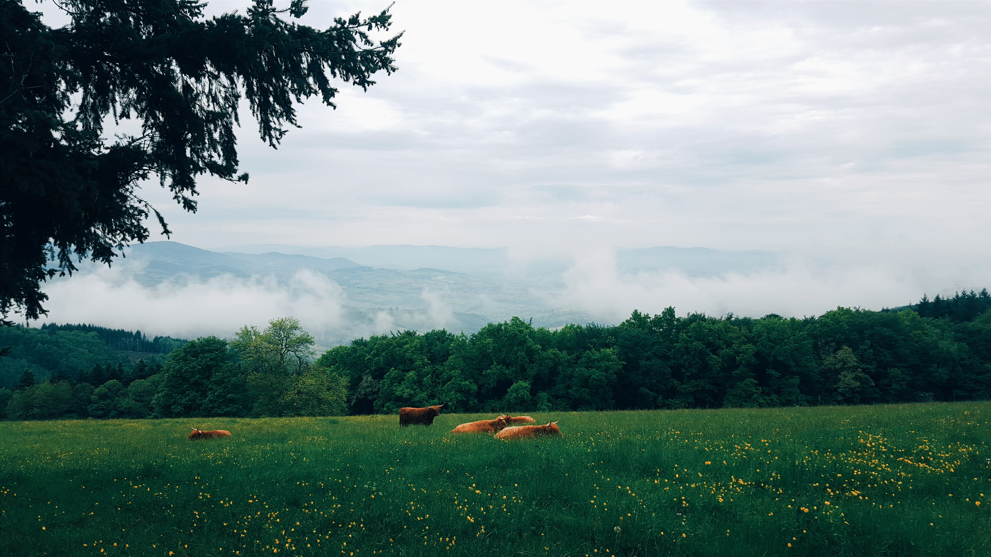 Chevinay